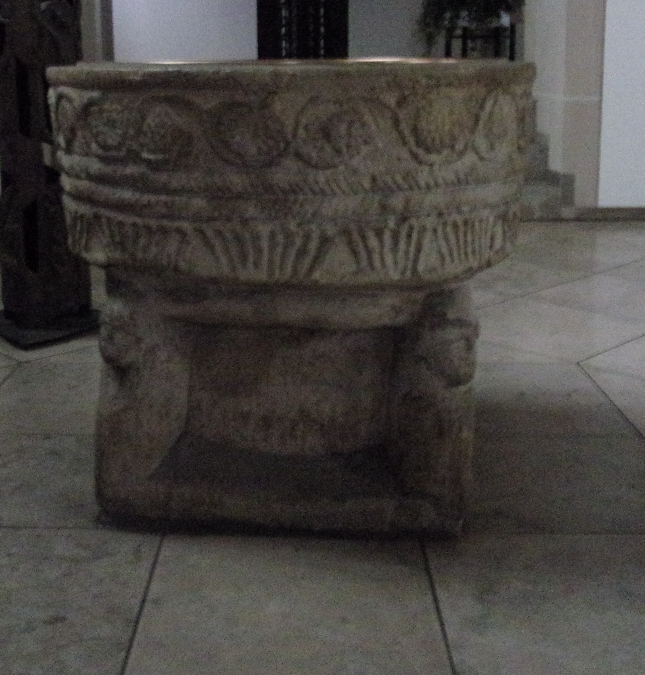 Taufbecken alte Kirche Wettringen